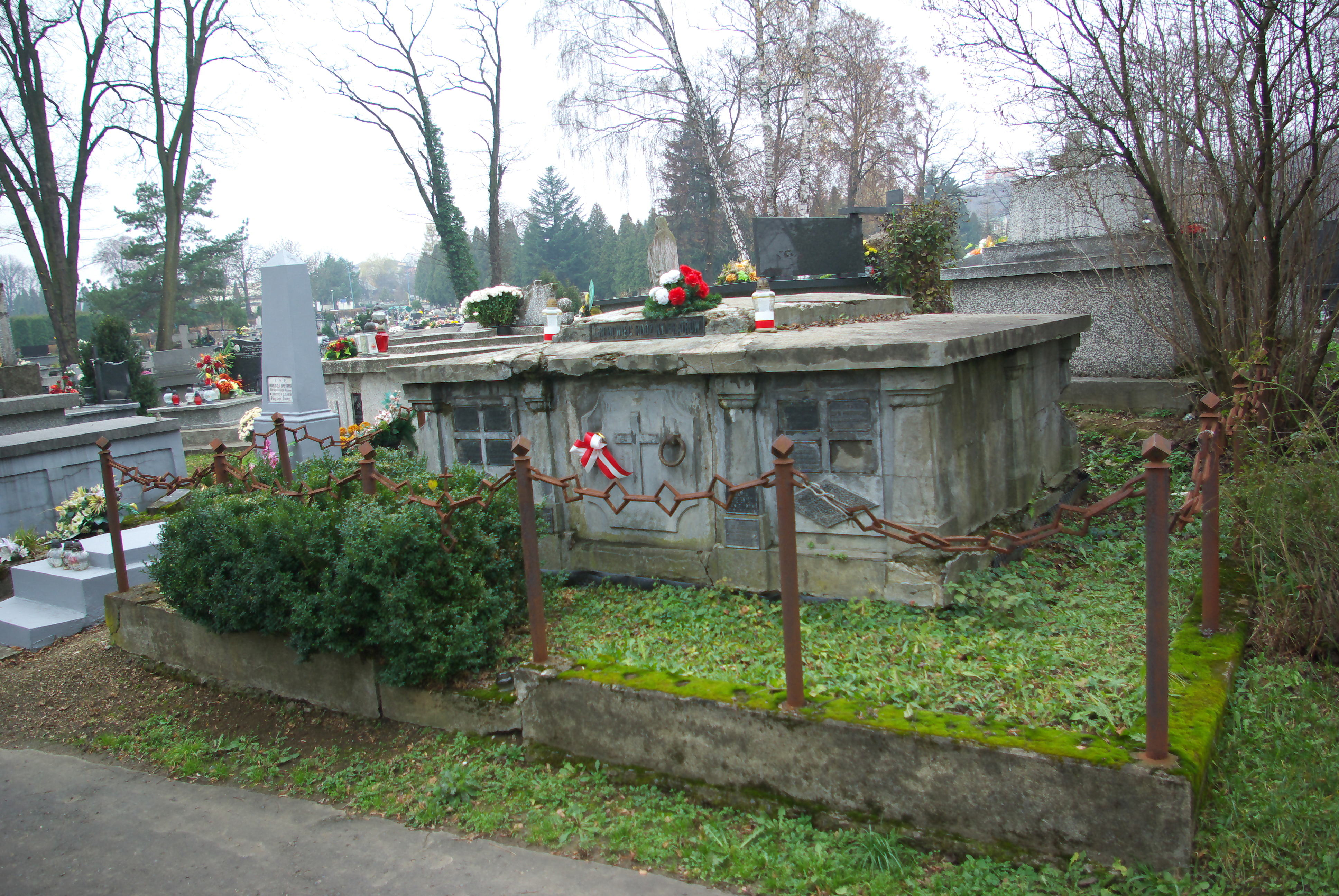 Grobowiec rodziny Bratro w części „Matejki Stary” Cmentarza Centralnego w Sanoku